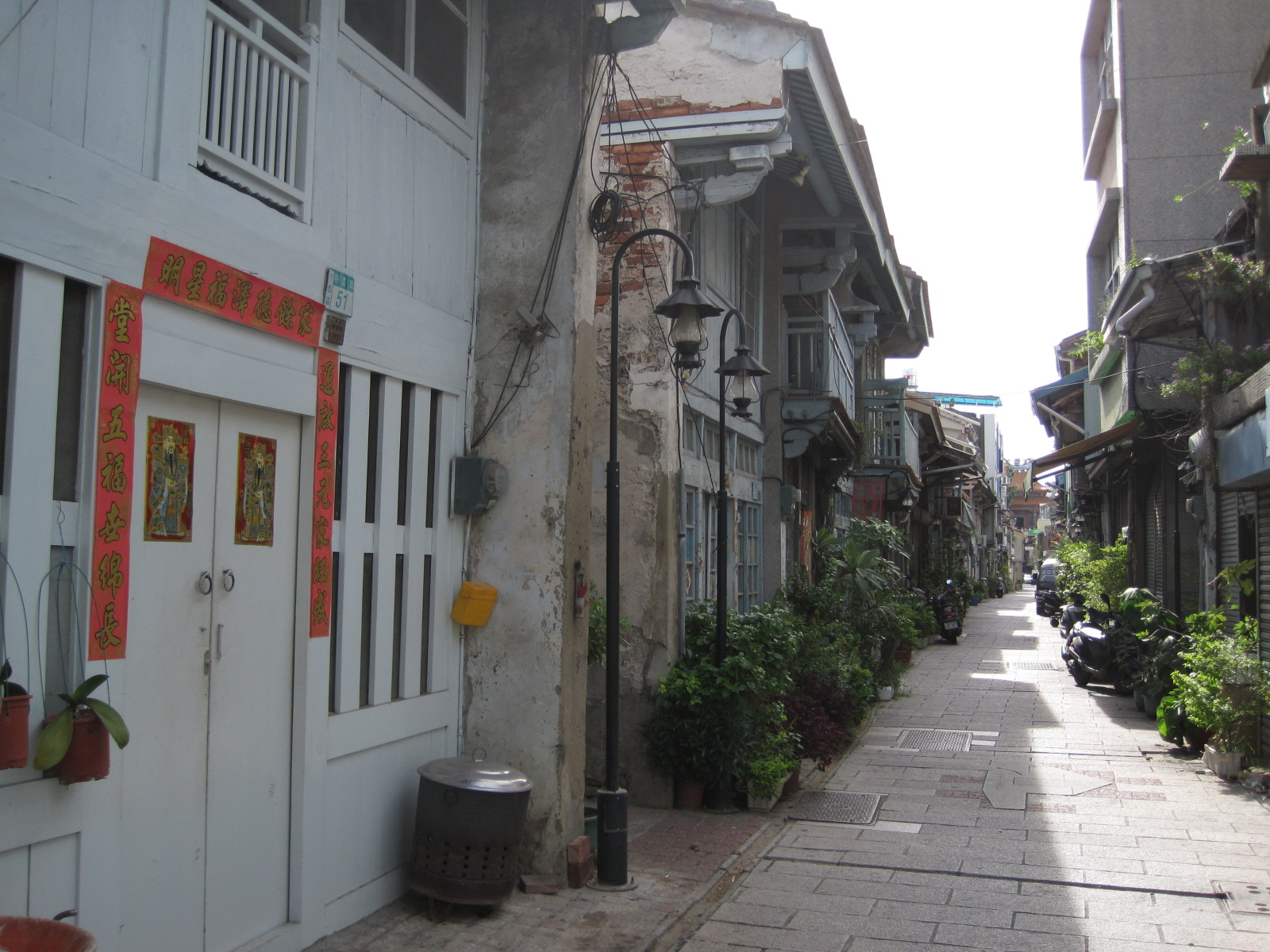 臺南北勢街(今神農街)